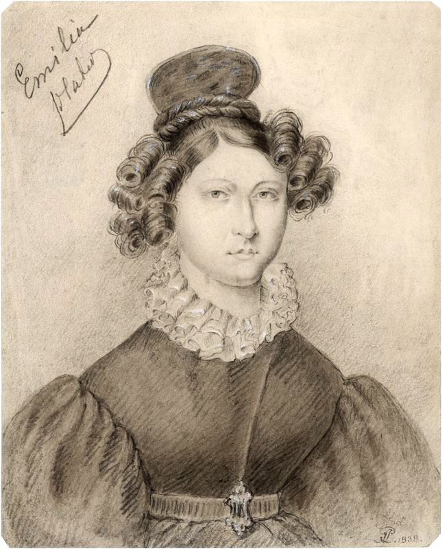 Emilia Plater (1806-1831)